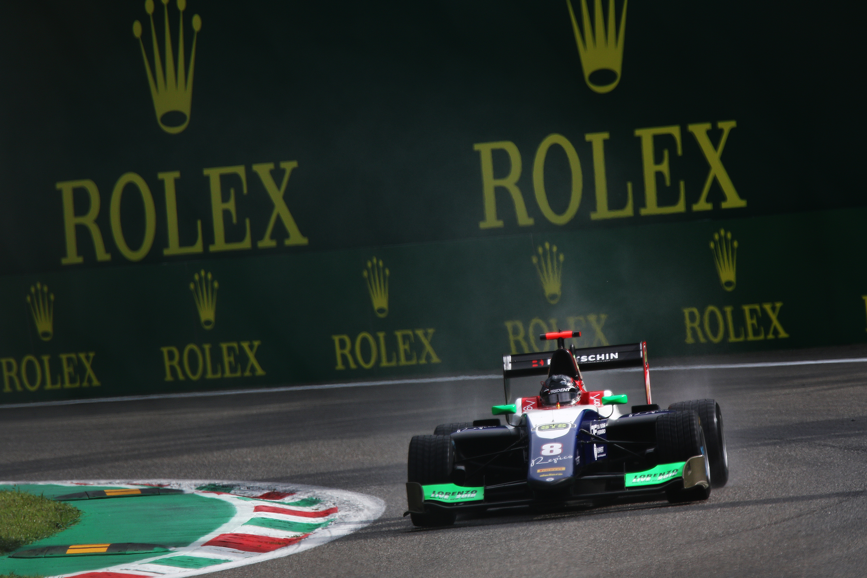 2018 GP3 Series, Autodromo Nazionale Monza.